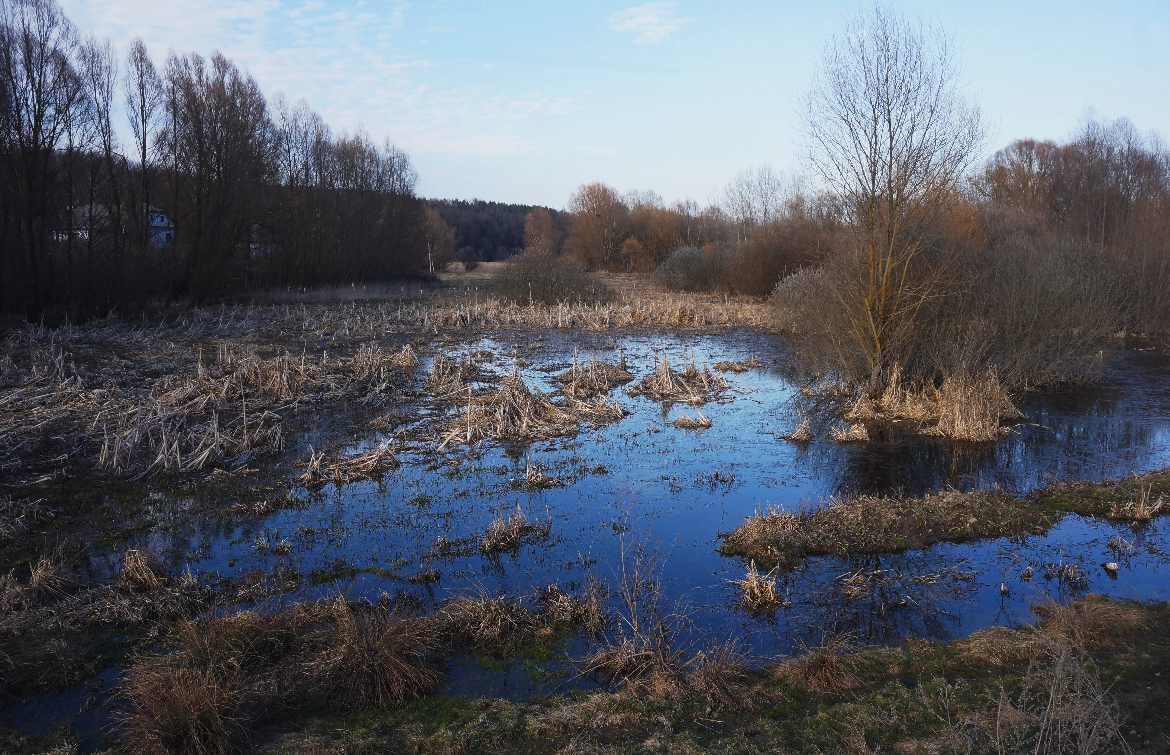 Вовчанський заказник, Деражнянський район, заплава р. Вовк